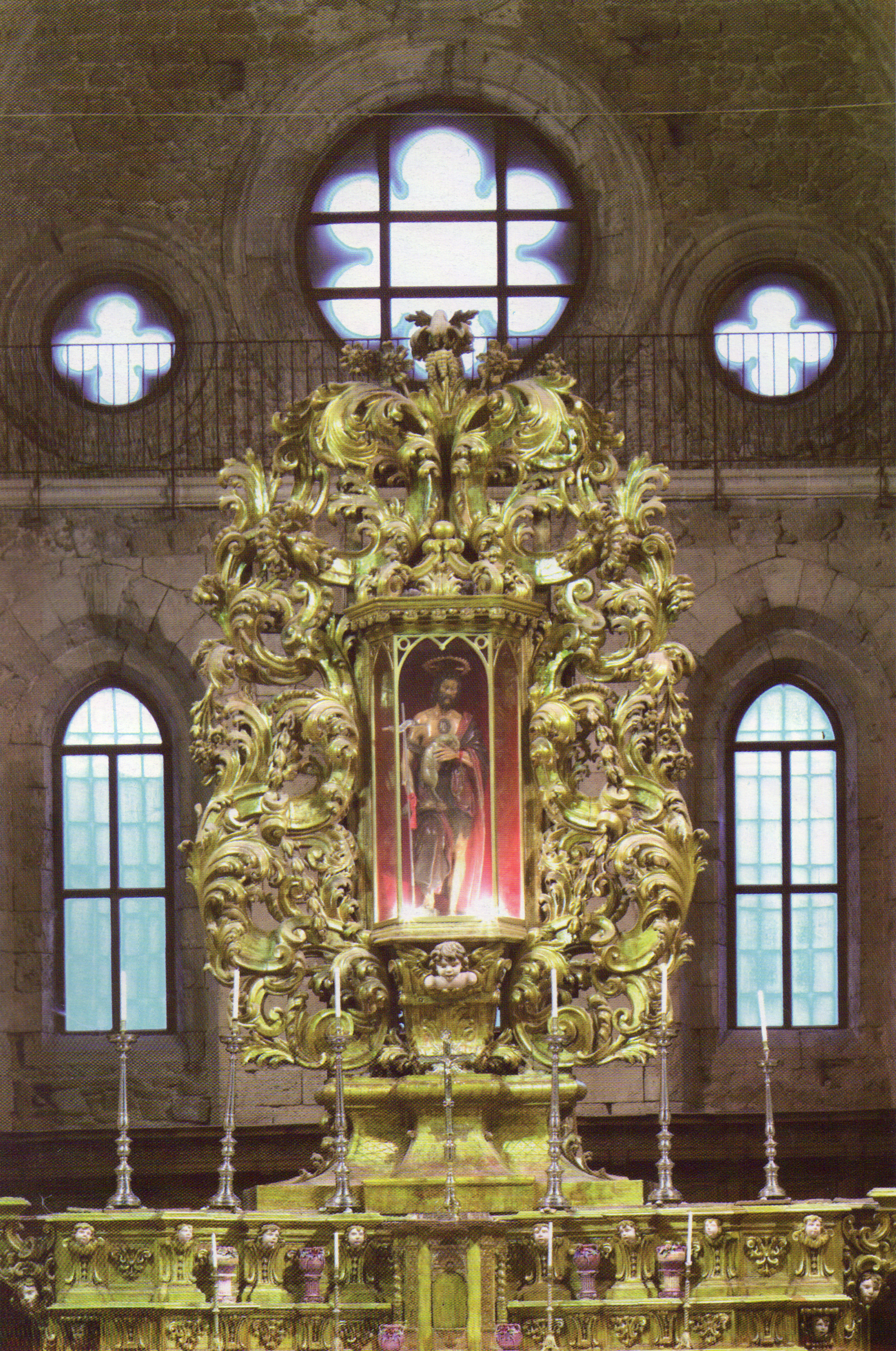 Altare abbazia florense - Statua San Giovanni in Fiore